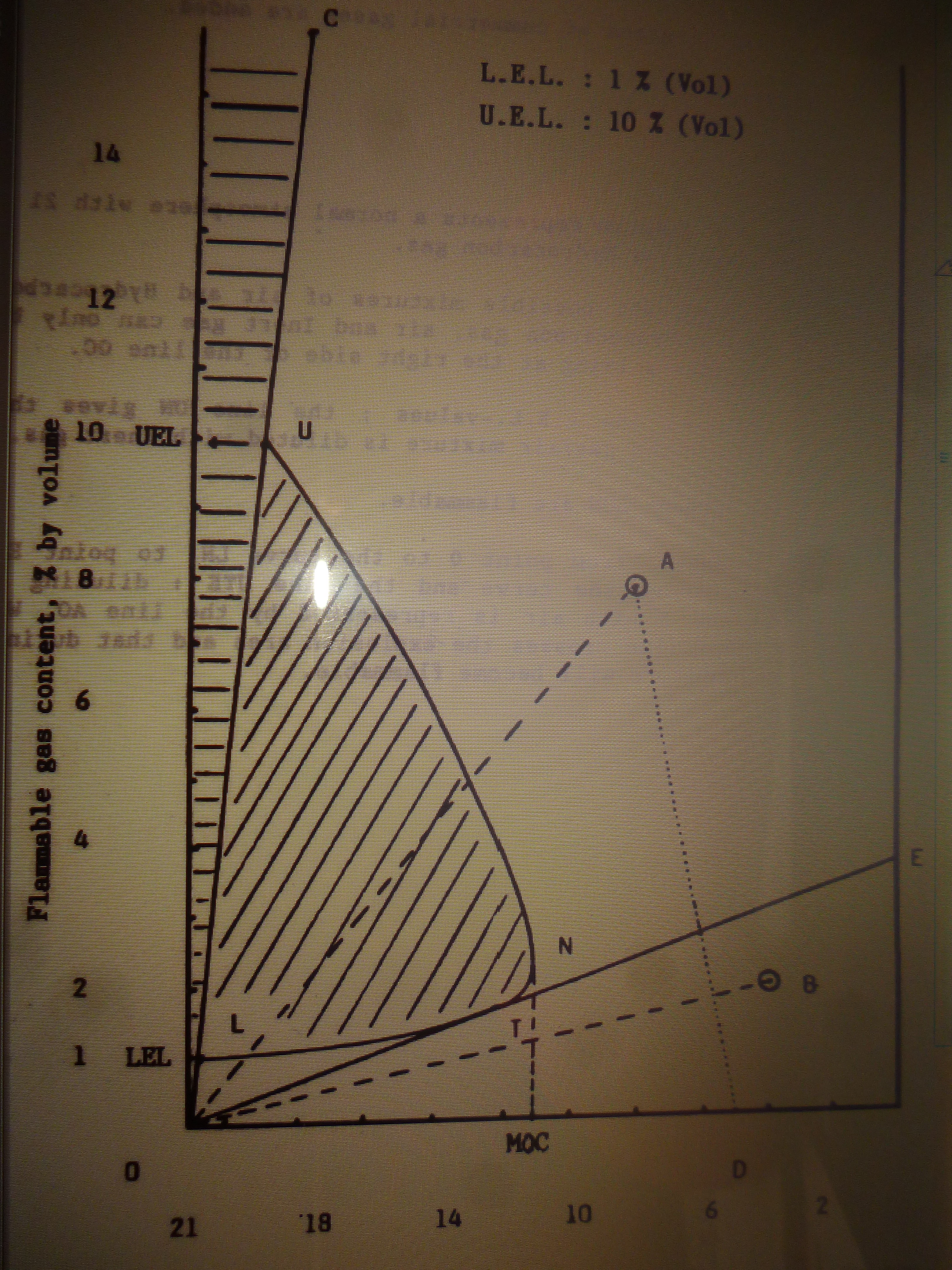 Ce diagramme représente les zones d'inflammabilité